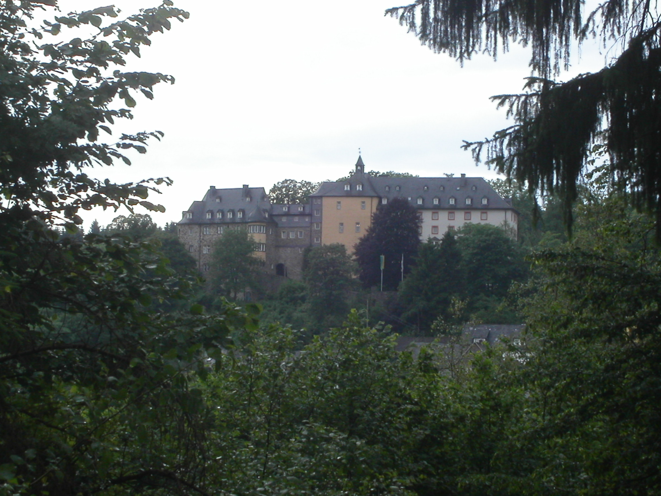 Jugendherberge Freusburg Dosiero:Kirchen (Sieg) Freusburg.jpg